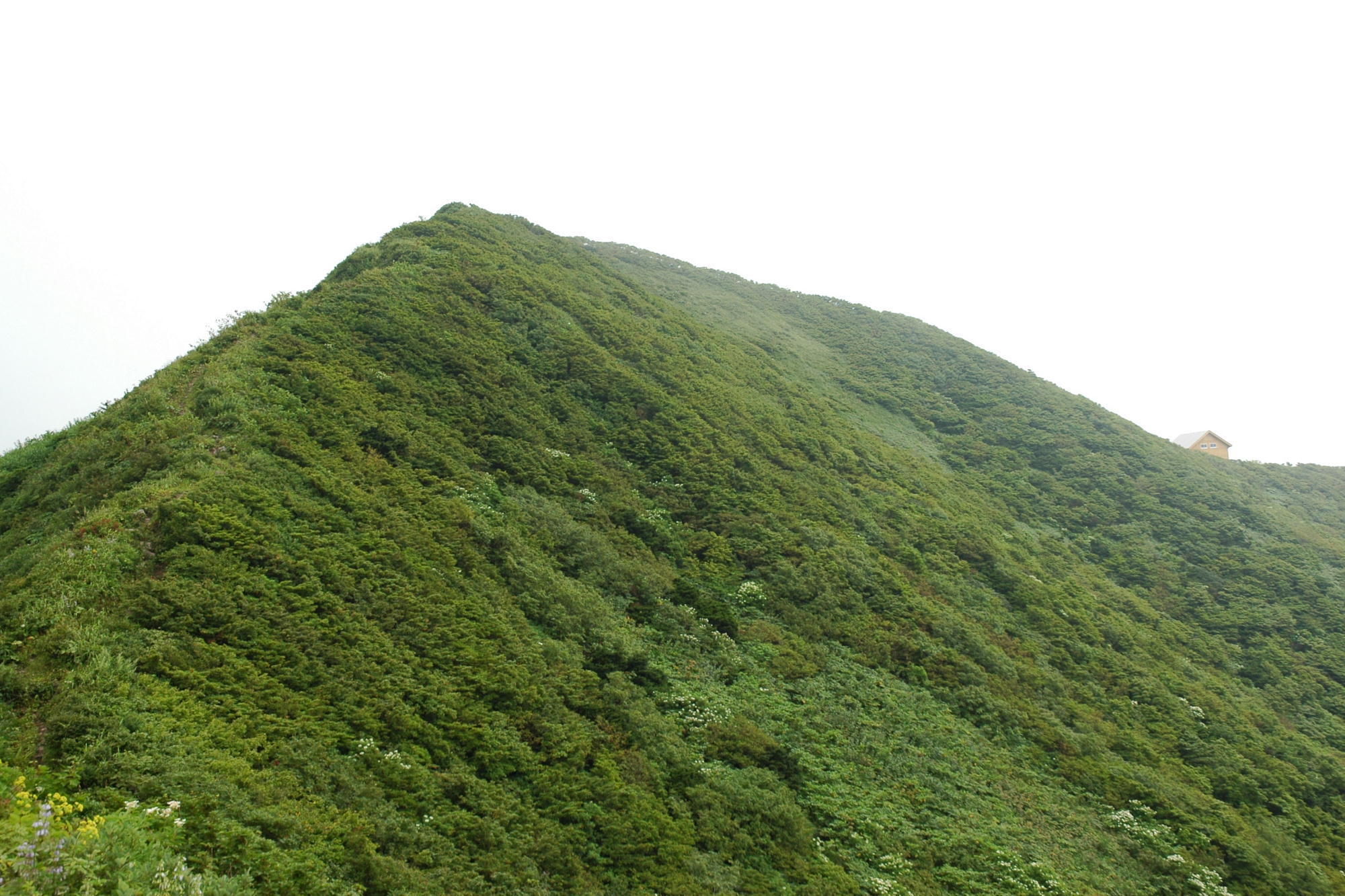 西ノ又分岐との中間点の鞍部から見た神室山